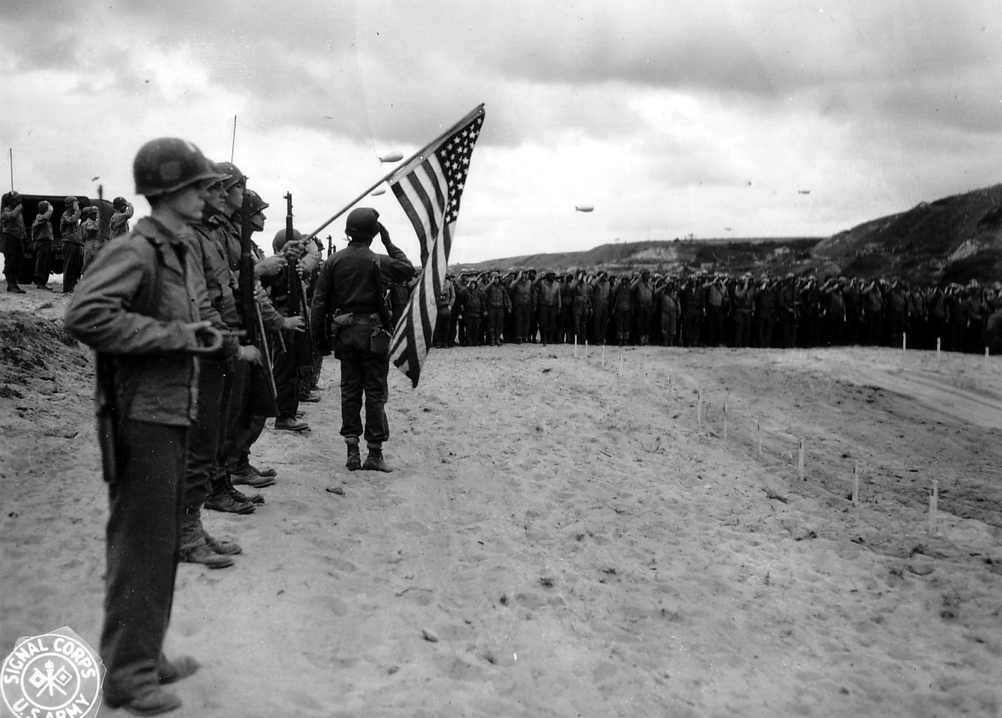 La garde au drapeau et le clairon, une messe à l'emplacement du premier cimetière provisoire à Vierville, Voir ici : On distingue les piquets en bois au-dessus de chaque tombe. Plusieurs ballons de barrage dans le ciel. Deux films de cette cérémonie: 4 photos de cette messe, le 10 juin 1944 sous réserve: p012156, p012196, p013473 et p013476. Autre vue du clairon au premier plan: Il porte l'arc blanc sur le casque soit 5 ou 6th ESB et un carré en latéral sur son casque comme le soldat sur la p012524 : PhotosNormandie n'a pas trouvé la signification de ce carré, ce sujet a été abordé sur plusieurs forums sans obtenir de solution.